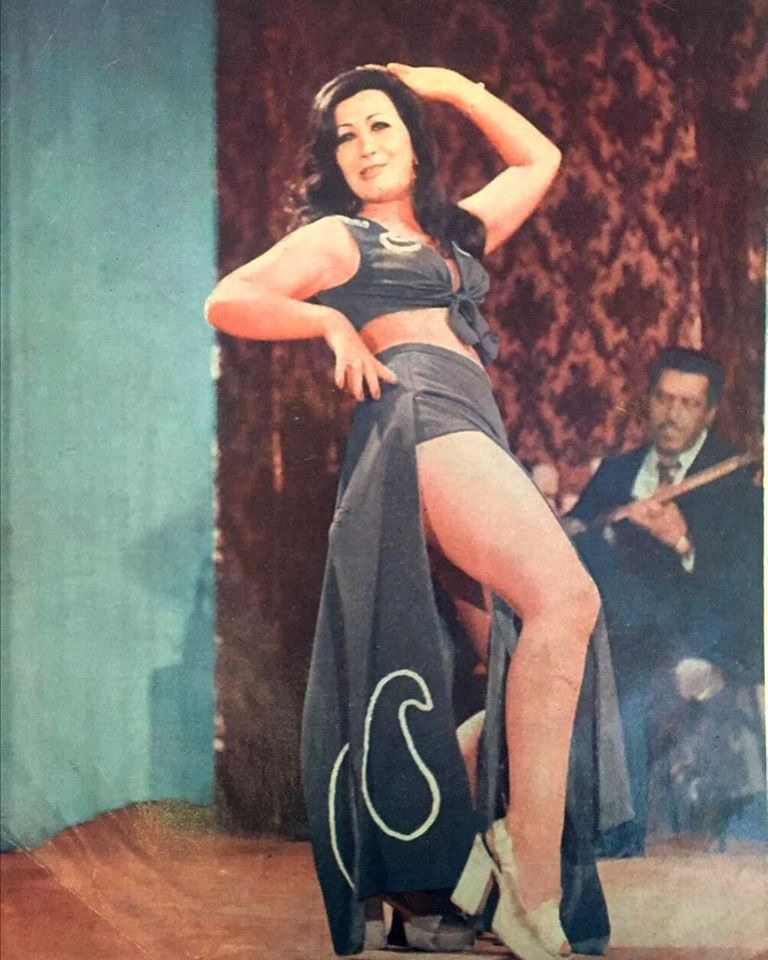 فرنگیس فرحزادی